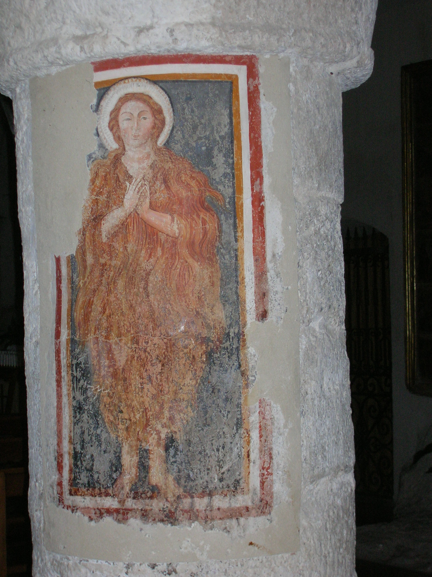 chiesa di S. Maria Assunta e di San Franco (Assergi) affresco Santa Maria Maddalena